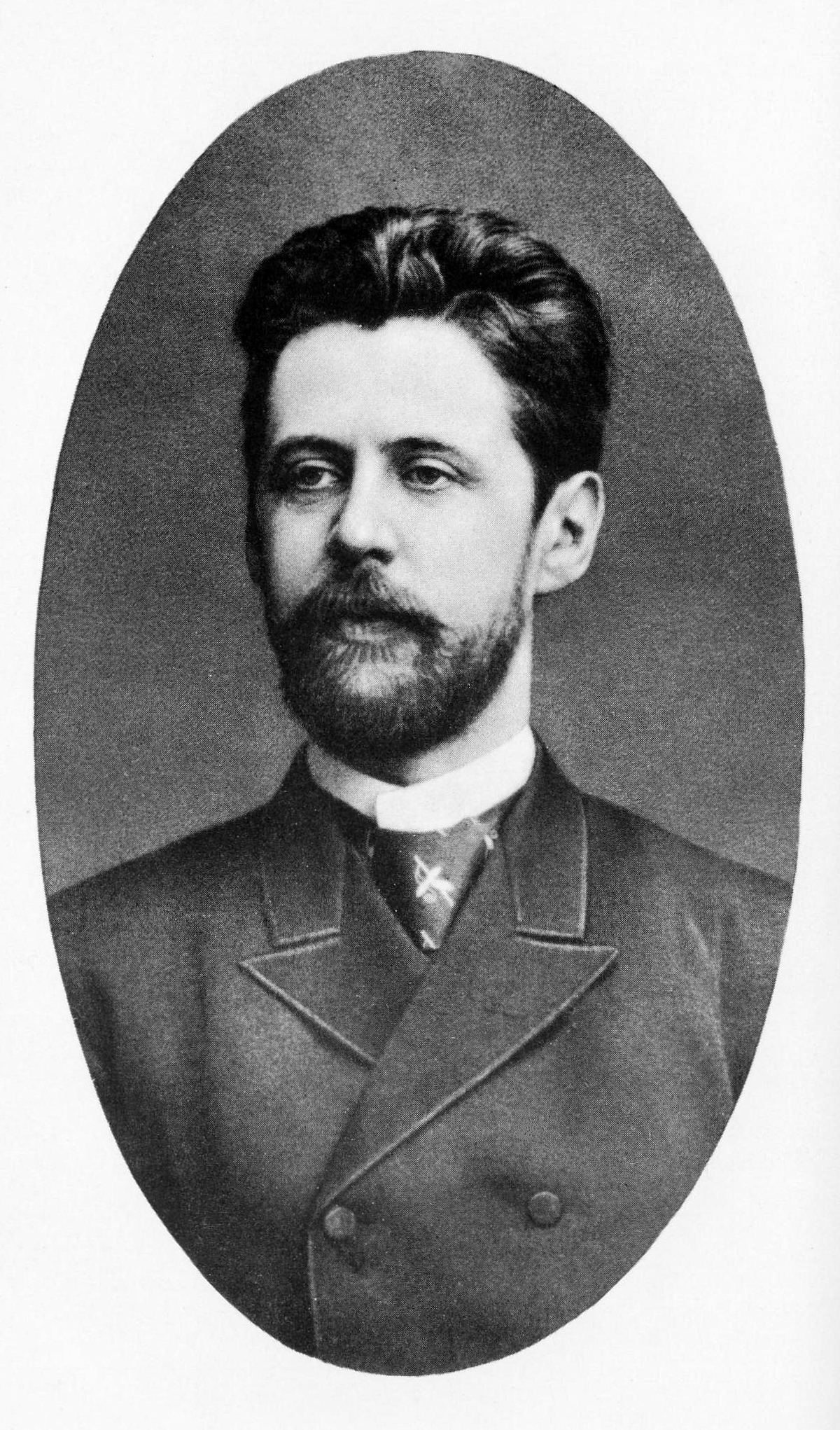 Photography of Innokenty Annensky (1855—1909), Russian poet |Иннокентий Фёдорович Анненский. Фотография 1880-х годов. Пушкинский Дом.